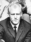 Skådespelaren Björn Gustafsson år 1961.